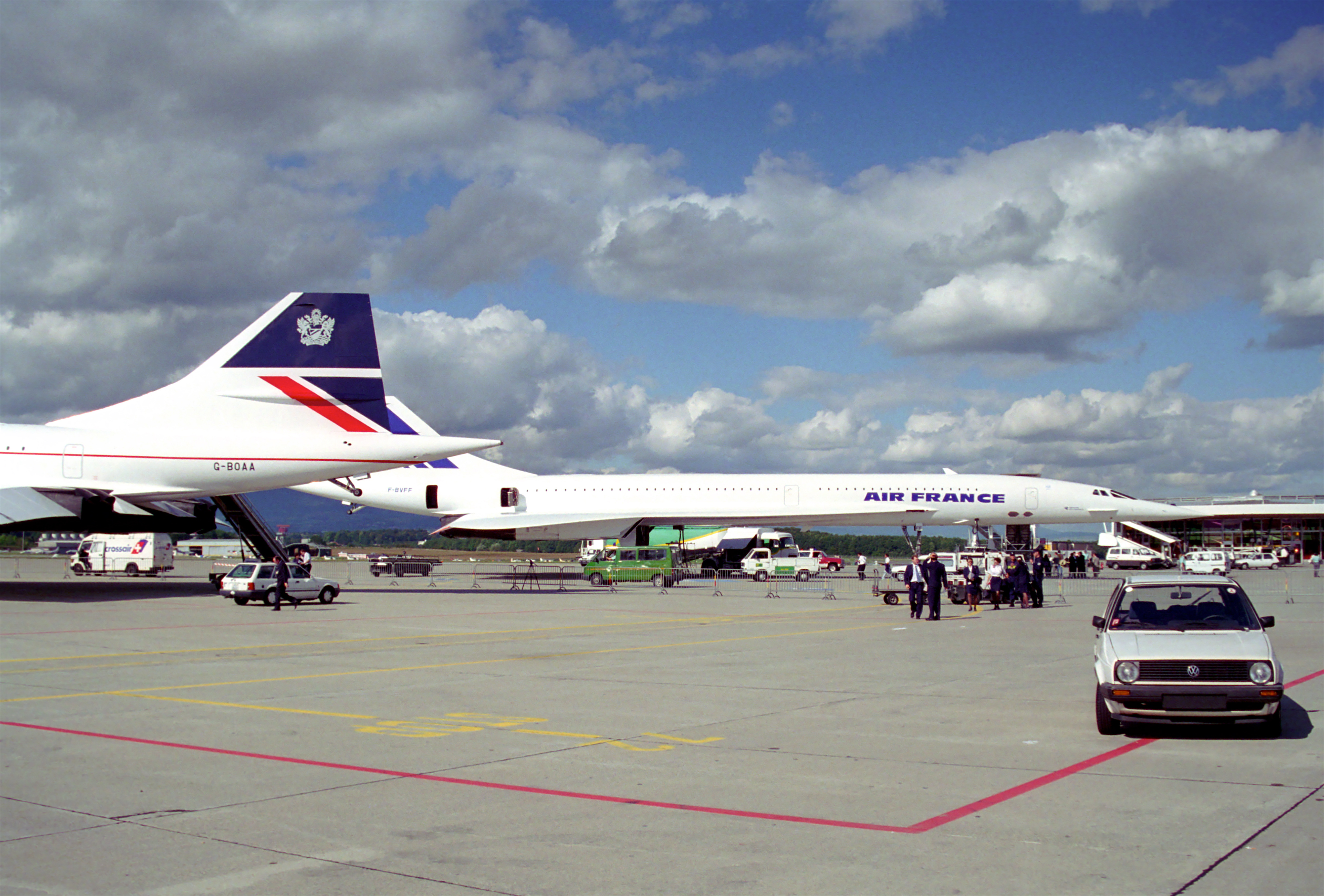 Air France Concorde; F-BVFF@GVA;09.09.1995